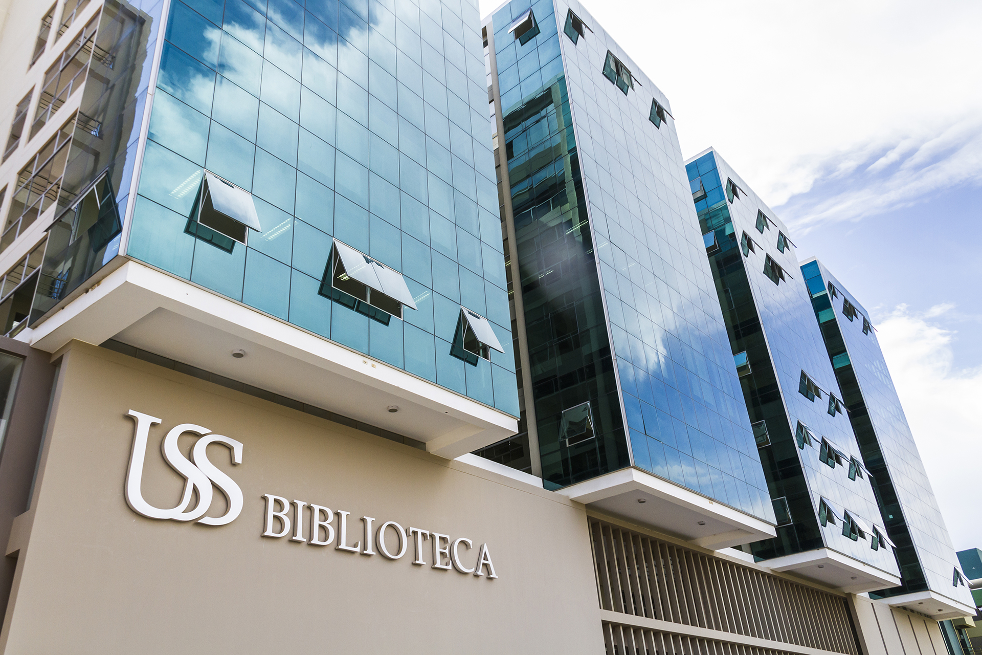 Biblioteca del campus USS